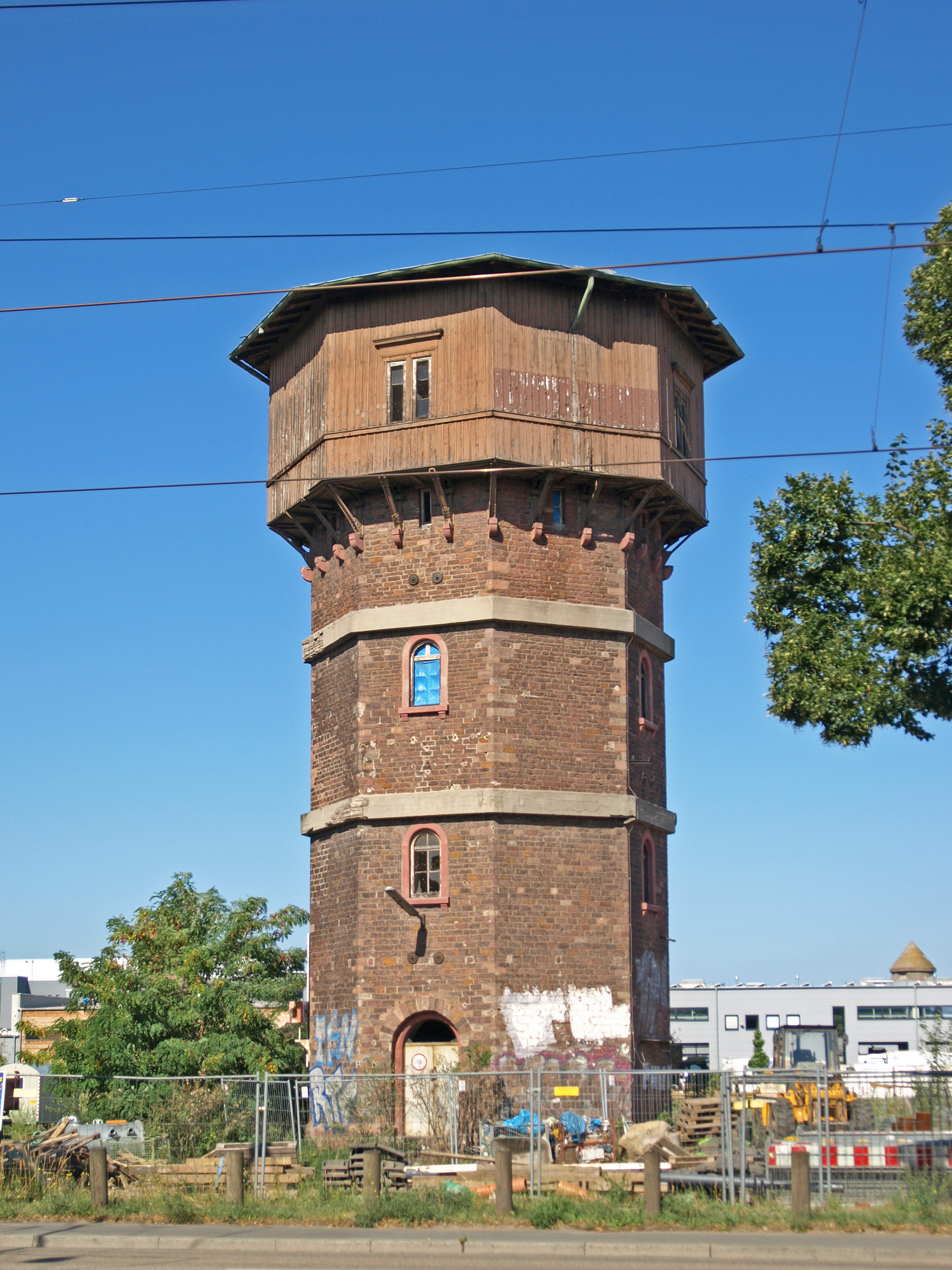 Wasserturm des ehemaligen Ausbesserungswerkes der Bahn in Darmstadt